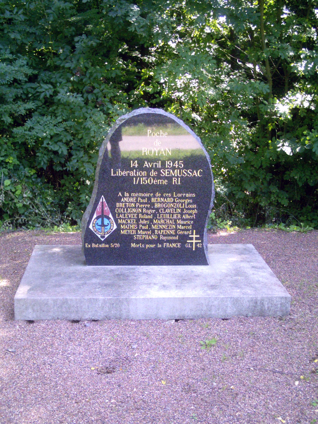 Monument du groupe lorraine 42